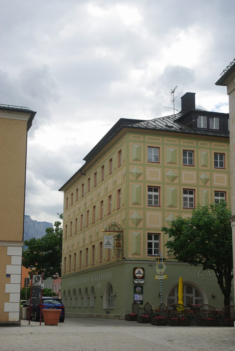 Brauereigasthof Bürgerbräu, Waaggasse 2 in 83435 Bad Reichenhall